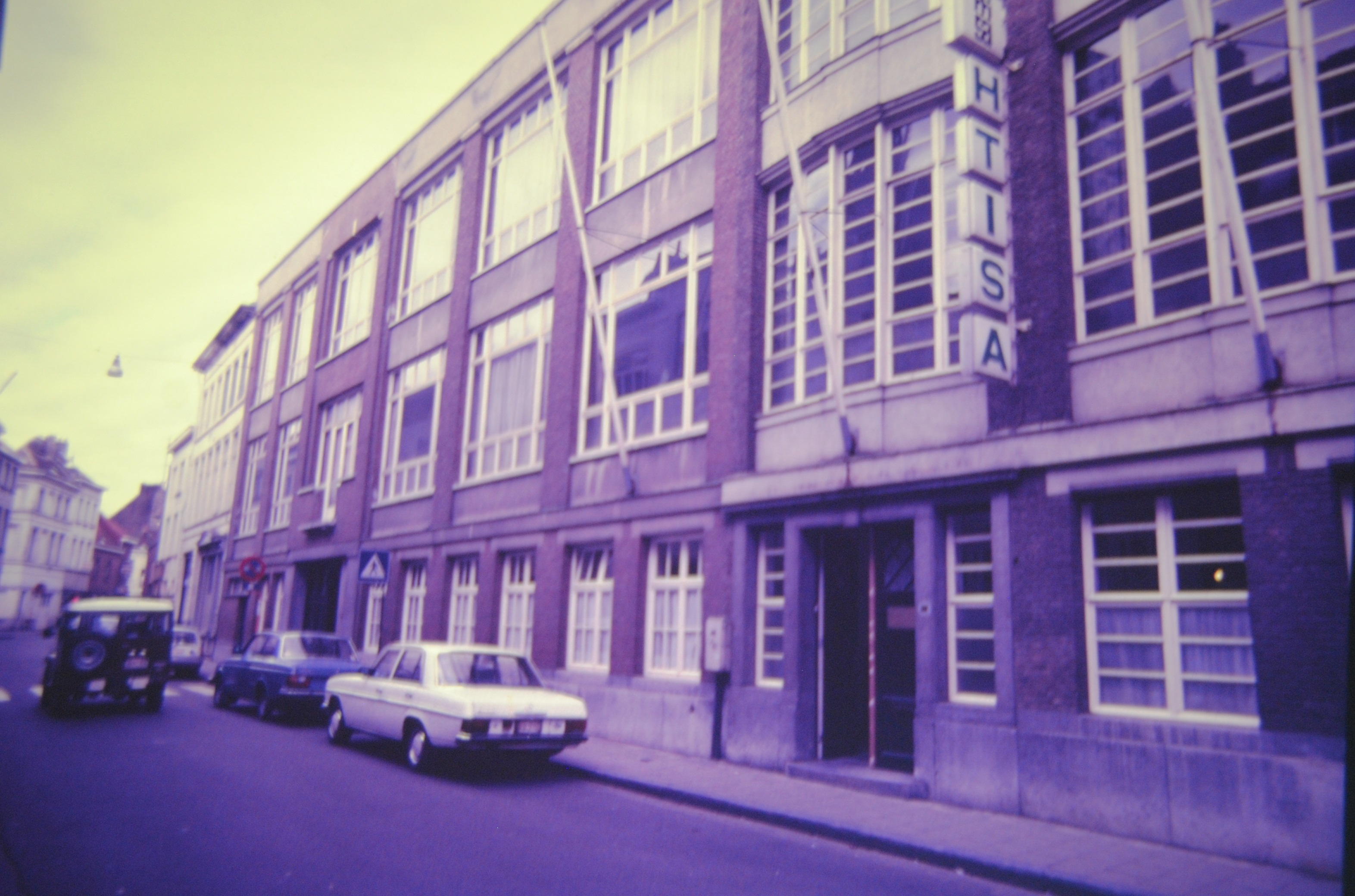 Foto van de holstraat (gevel HTISA) circa 1970 (gevonden tussen mijn oude foto's en nu gedigitaliseerd